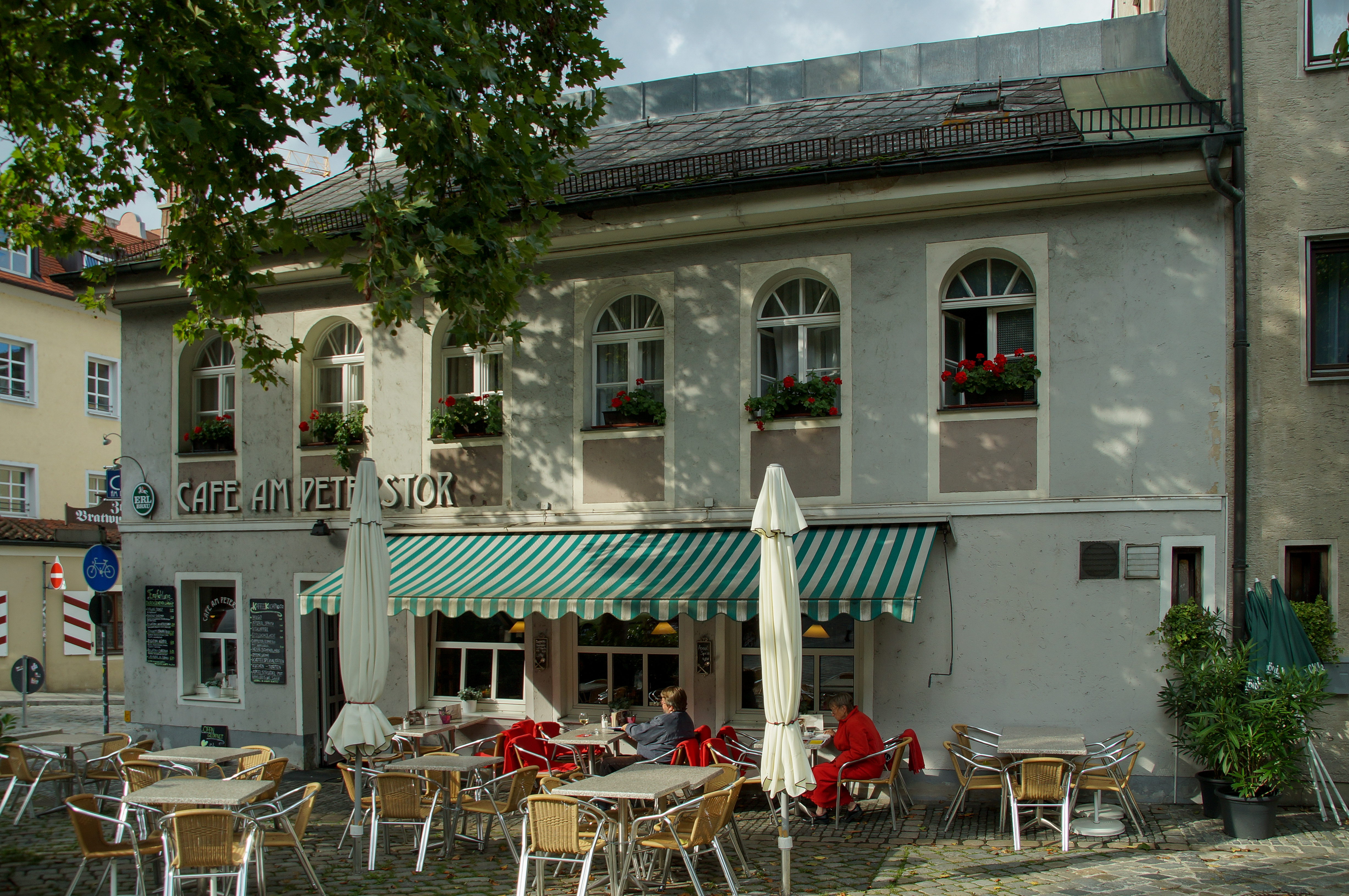 Wohn- und Geschäftshaus, zweigeschossiges Walmdachdach in Ecklage, mit Biedermeierfassade, 1833, innen Verlauf der Römermauer, um 179 n. Chr.; an der Haussüdseite Zwingermauer mit vorgelagertem Graben, hoch- und spätmittelalterlich.This is a photograph of an architectural monument.